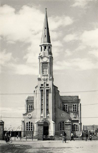 Nhà thờ Quy Nhơn xưa